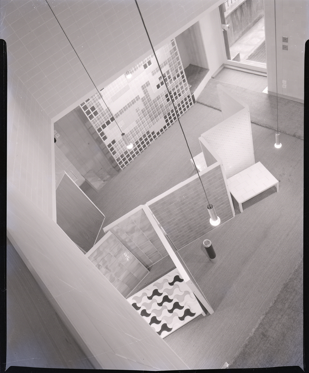 Servizio fotografico : Milano, 1957 / Paolo Monti. - Buste: 13, Fototipi: 16 : Negativo b/n, gelatina bromuro d'argento/ pellicola ; 10x12. - ((Serie costituita da 13 buste di negativi identificati con una doppia numerazione (da 99 a 110): 3850, 3851, 3852, 3853, 3854, 3855, 3856, 3857, 3858, 3859, 3860, 3861, 3862, 3863, 3864, 3865, e tenute insieme da una graffetta. . - Sulla busta identificata con il n. 3850 iscrizione didascalica manoscritta a matita. - Occasione: Documentazione dell'allestimento del negozio realizzato da Marco Zanuso. - Fonte: Rubrica di Paolo Monti: Archivio 10x12 (ultimi numerati) - dal G1 al (s.d.), presso Archivio Paolo Monti